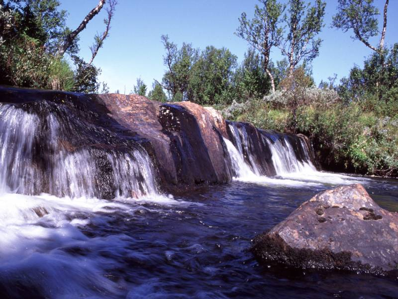 Der Fluss Arån in Jämtland, Schweden; the river Arån in Jämtland, Sweden